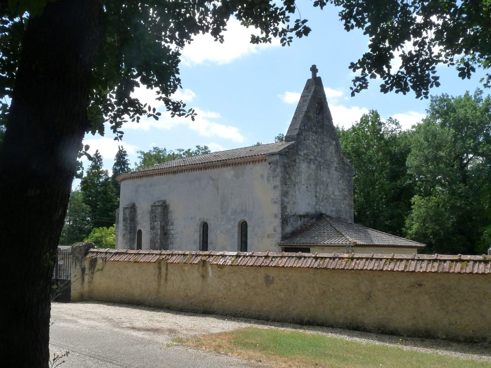 église de Caubeyres, Lot-et-Garonne, France